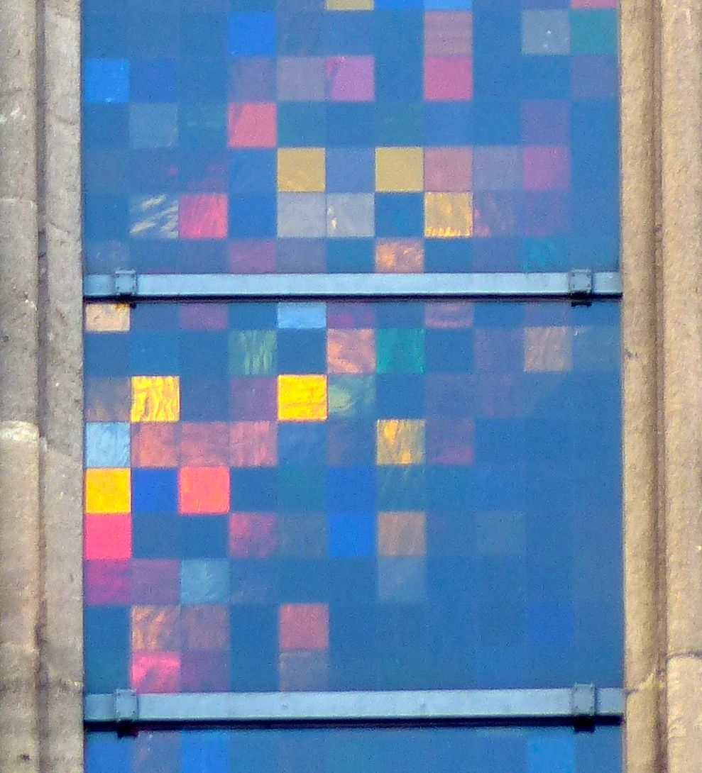 Richter-Fenster am Kölner Dom (Detail, Blick von außen)